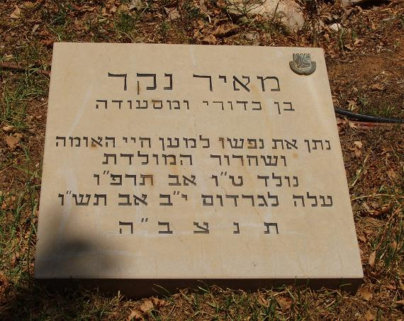 המצבה שהונחה על קברו של מאיר נקר. לאחר החלפתה במצבה של משרד הביטחון, הועברה המצבה, יחד עם מצבות שאר חללי הפריצה לכלא עכו, לאתר הנצחה ליד מבצר שוני. צילם דוד שי